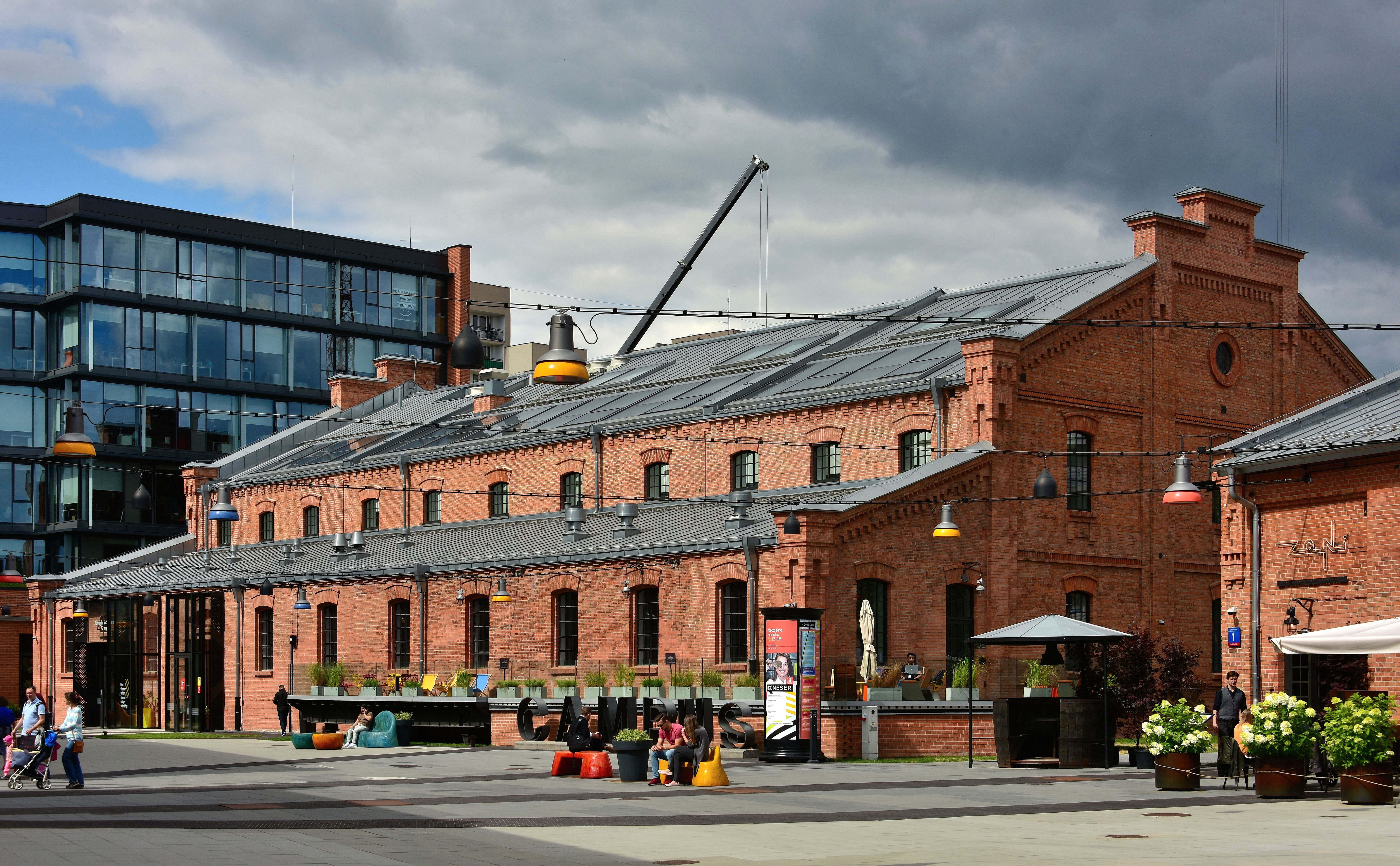 Kompleks dawnej Warszawskiej Wytwórni Wódek „Koneser”. Dawny magazyn spirytusu, obecnie siedziba Google for Entrepreneurs Campus